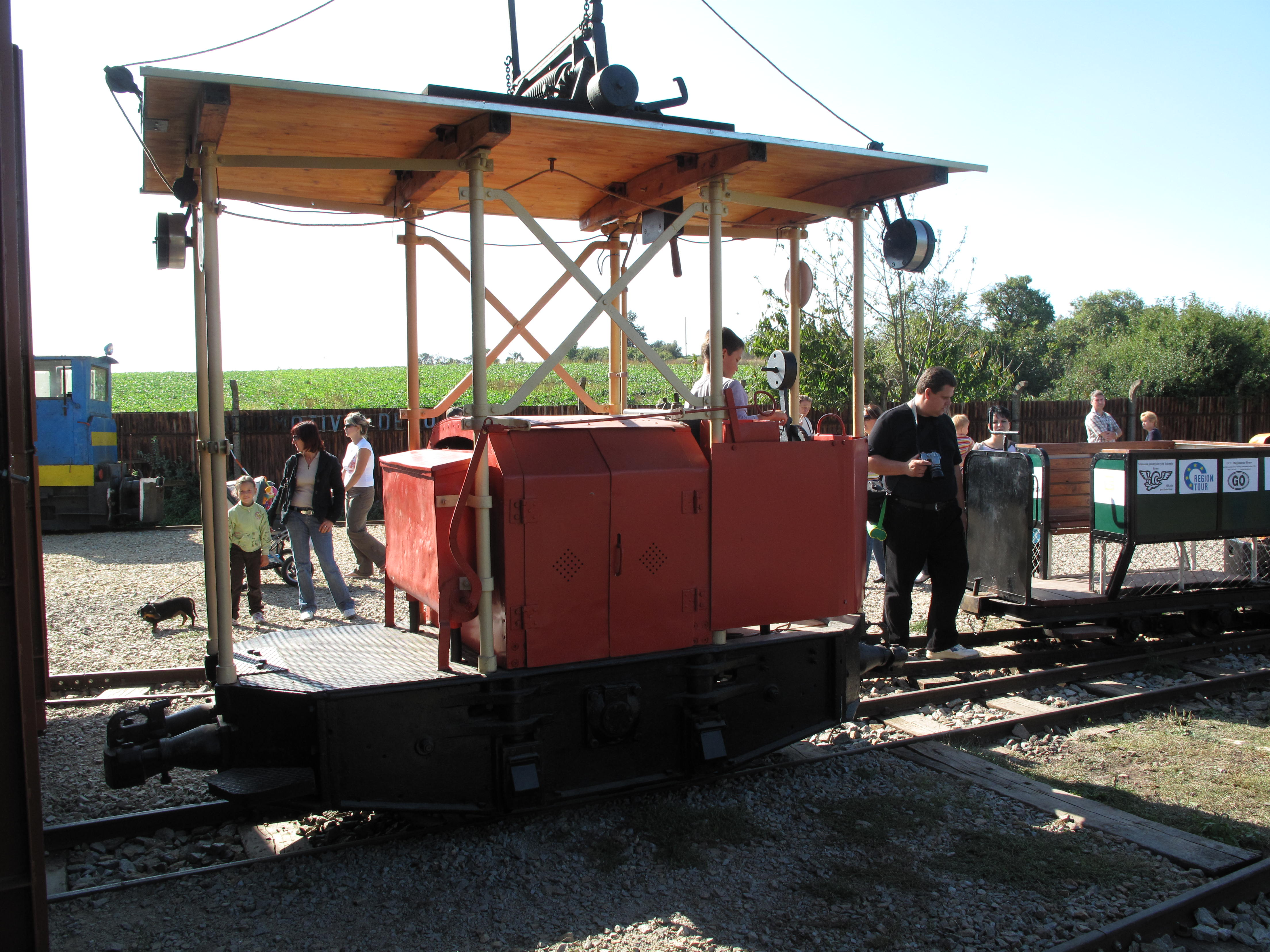 Muzeum průmyslových železnic, elektrická lokomotiva Siemens-Schuckert č. 13